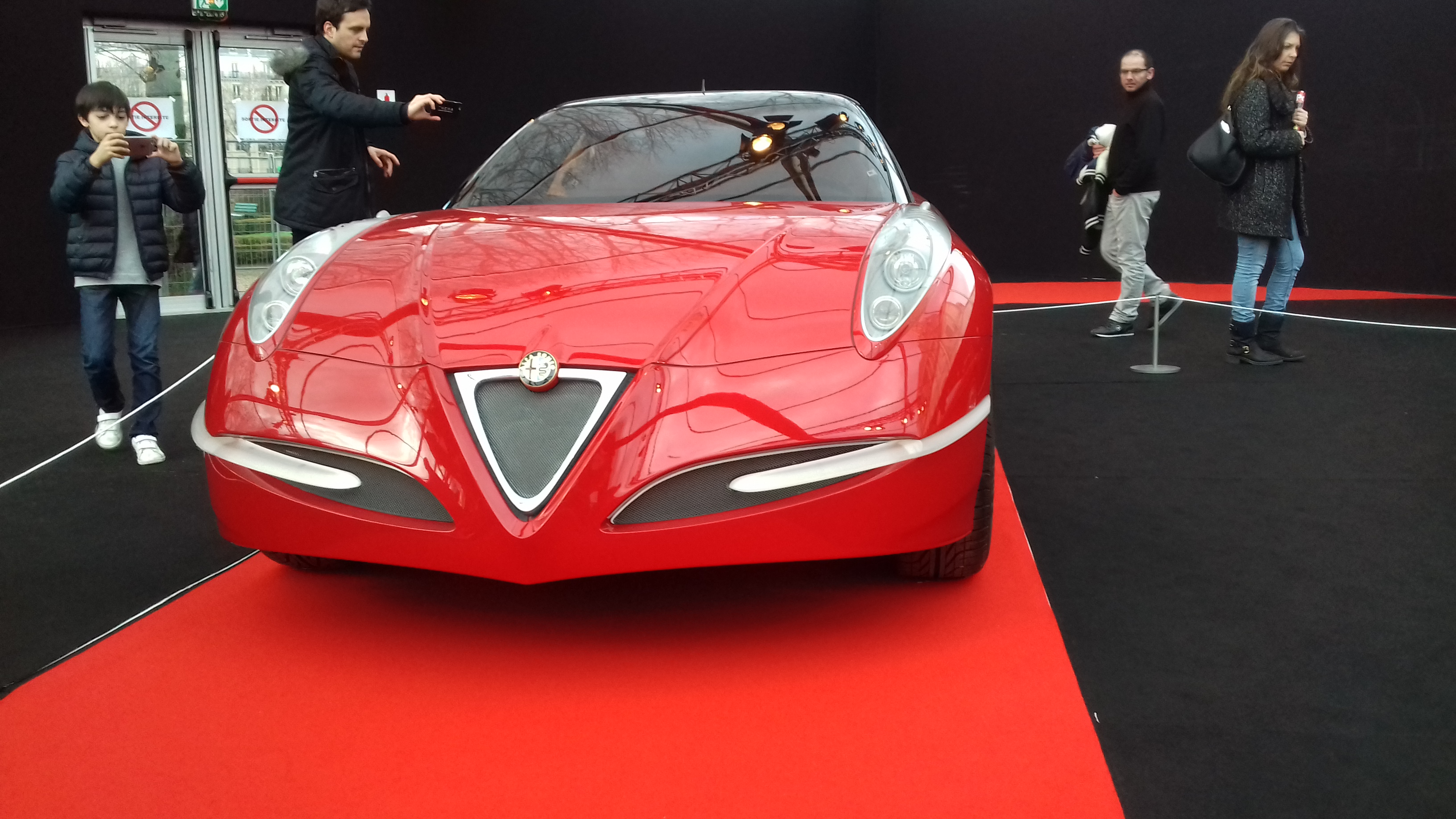 Alfa Romeo Vola au Festival automobile international 2017